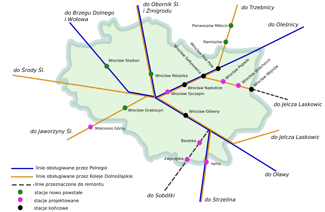 Wrocławska Kolek Aglomeracyjna w r. 2017